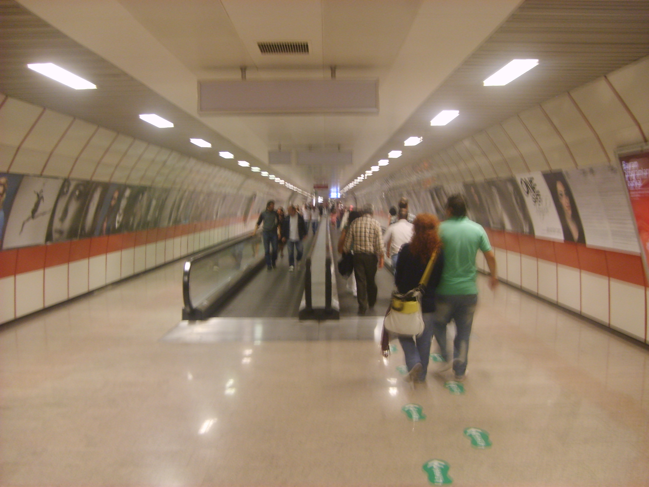 Istanbul Metrosu Taksim istasyonu yürüyen bantları